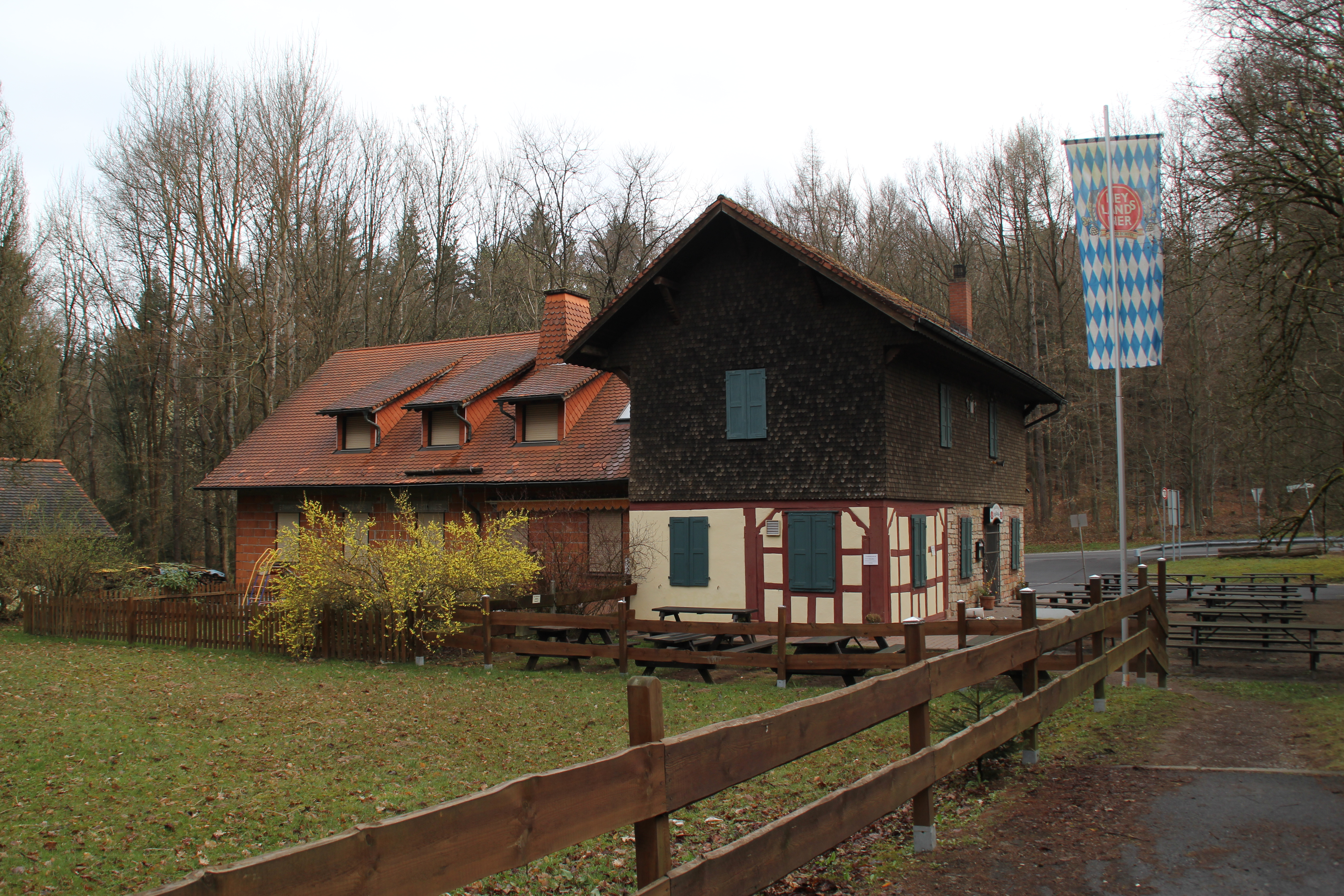 Das Waldhaus Engländer im Spessart bei Jakobsthal, Bayern